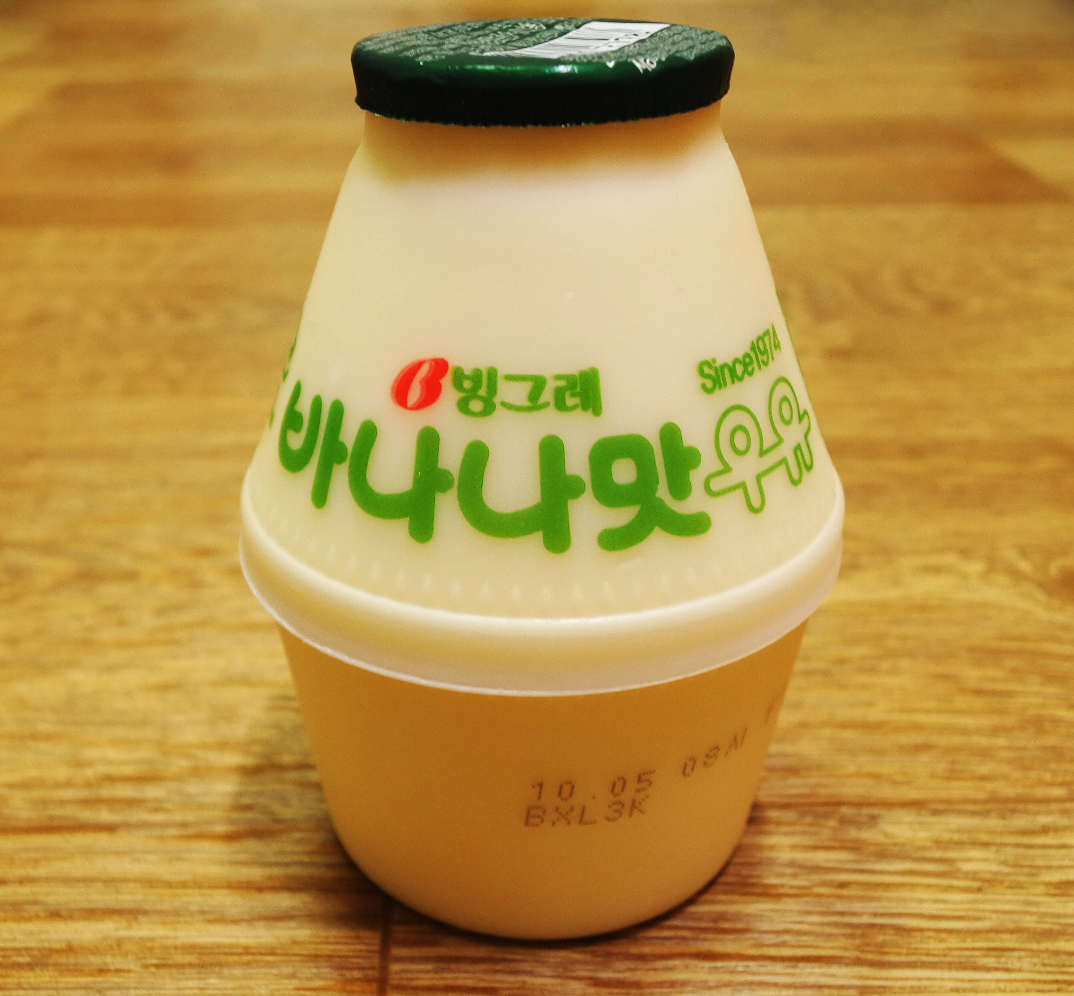 Banana milk